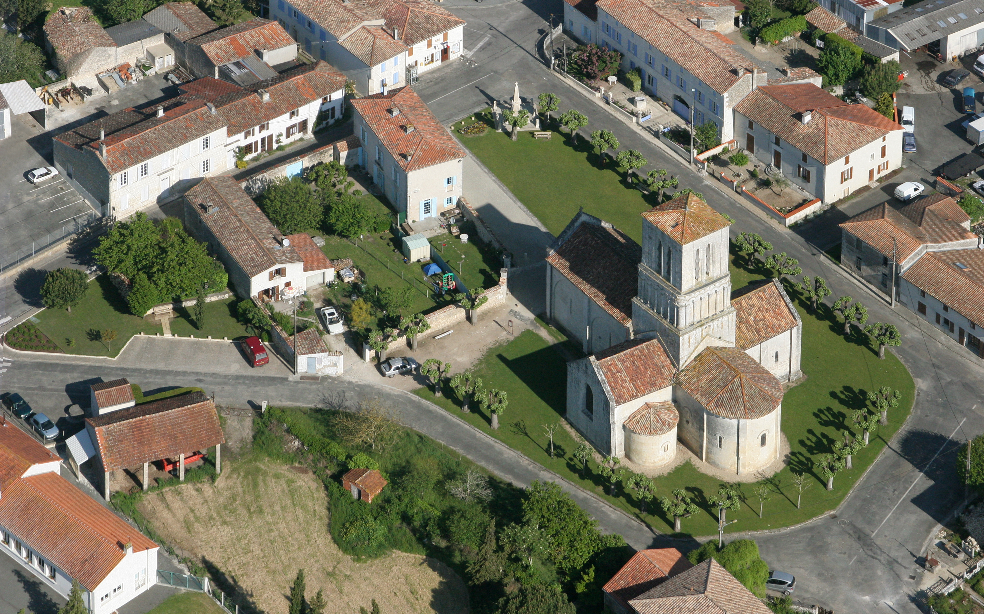 CORME-ÉCLUSE Charente-Maritime Au coeur du bourg : l'église .